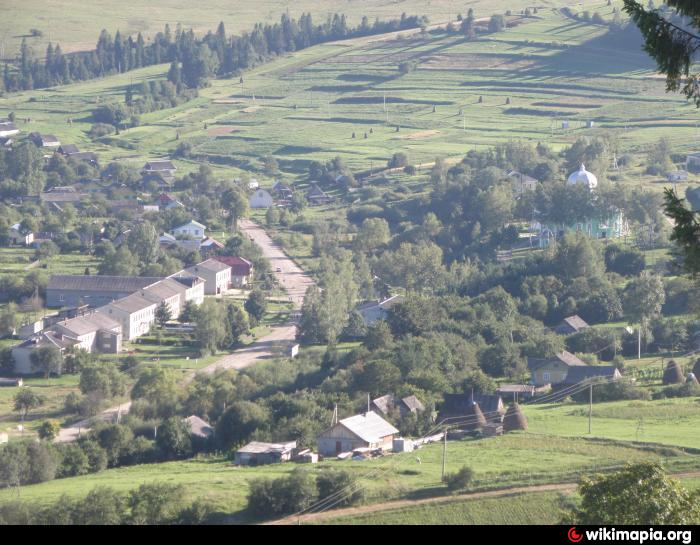 Село Верхнє Висоцьке